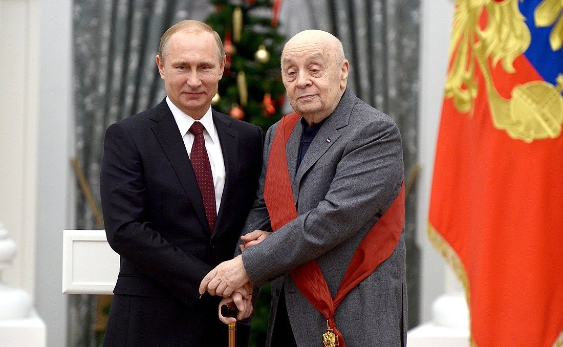 Церемония вручения государственных наград Российской Федерации. Награждение Леонида Броневого ОРДЕНОМ «ЗА ЗАСЛУГИ ПЕРЕД ОТЕЧЕСТВОМ» I СТЕПЕНИ. 22 декабря 2014 года